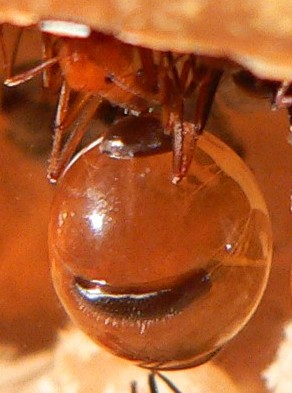 Formigas Pote de Mel - operarias especializadas em armazenar alimento em seus corpos